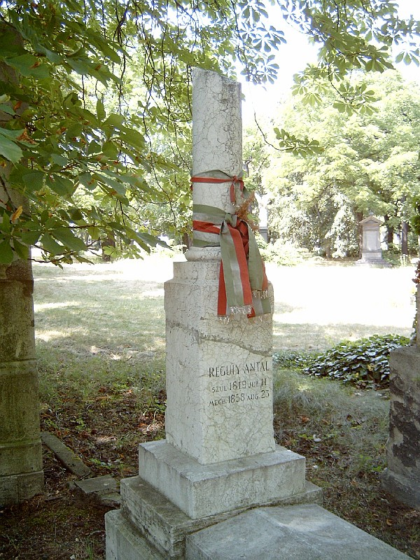 Reguly Antal (Zirc, 1819. júl. 11. – Buda, 1858. aug. 23.): nyelvtudós, etnográfus és utazó sírja Budapesten. Kerepesi temető: 29/1-1-2 [kivitelező: Gerenday-cég].